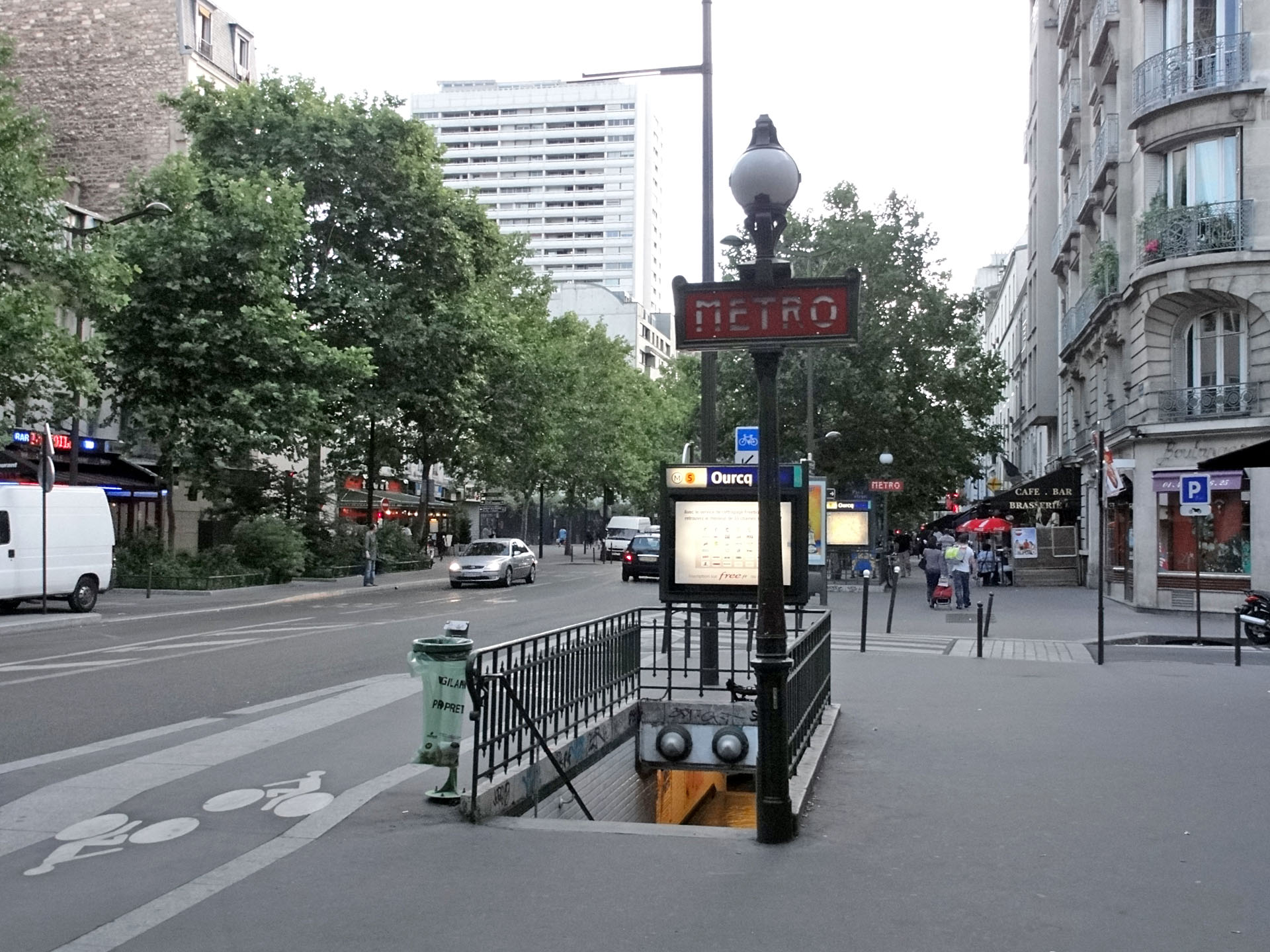 La station Ourcq de la ligne 5 du métro de Paris, France.